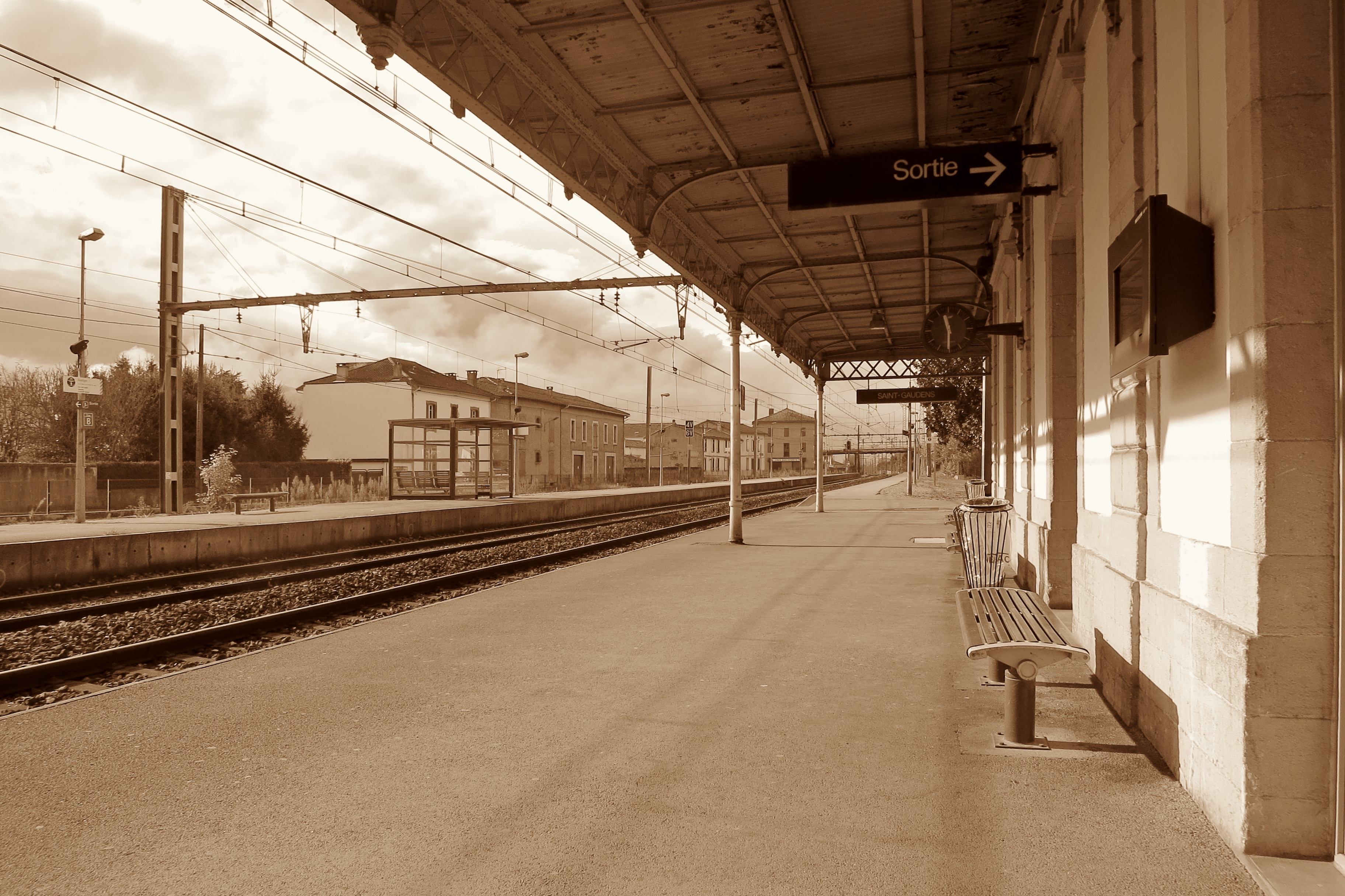 Saint-Gaudens (Haute-Garonne, Midi-Pyrénées, France) - Gare de Saint-Gaudens.